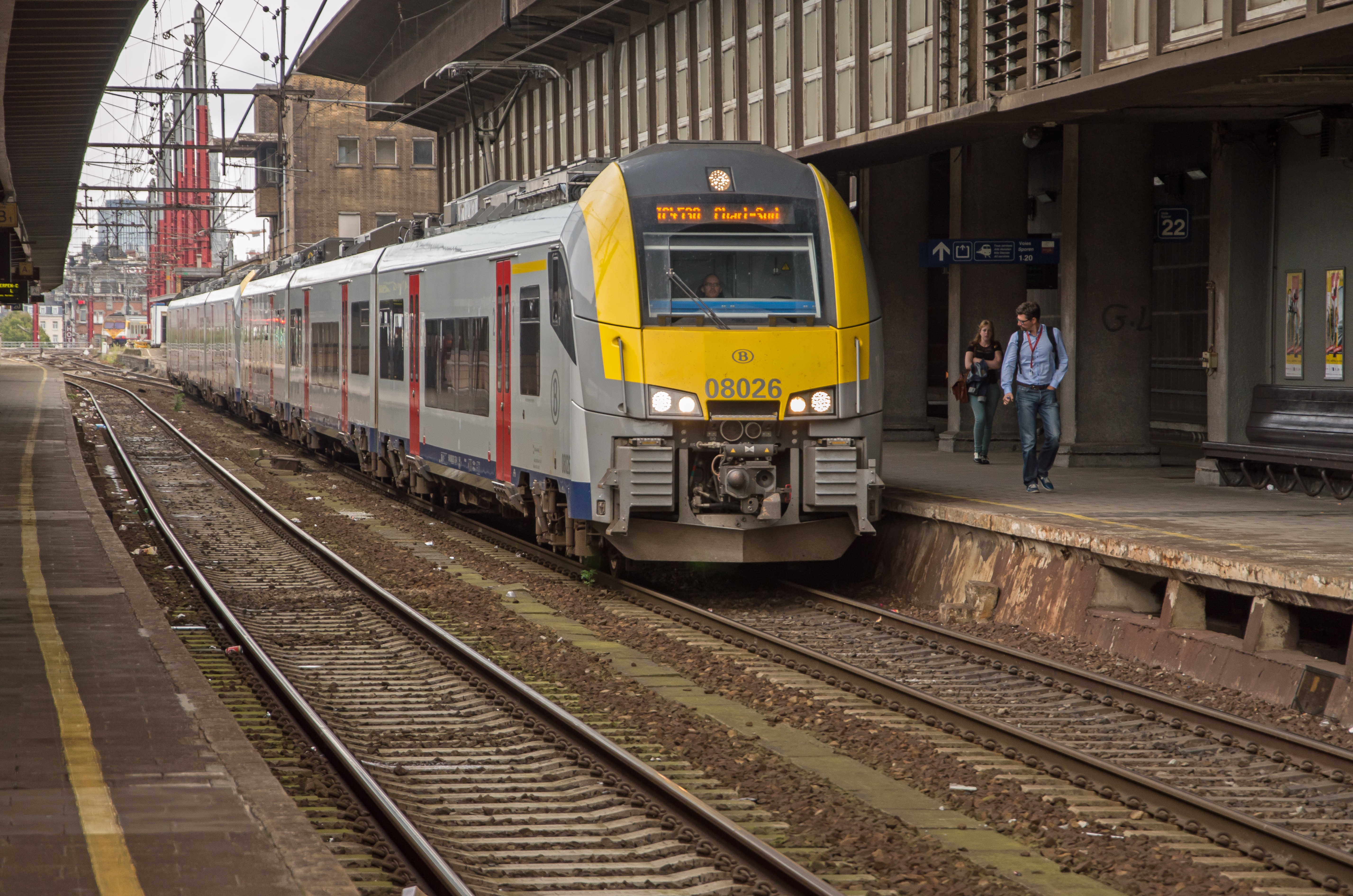 Brussel-Zuid NMBS 08026 uit Antwerpen als IR naar Nijvel komt Brussel binnenrijden